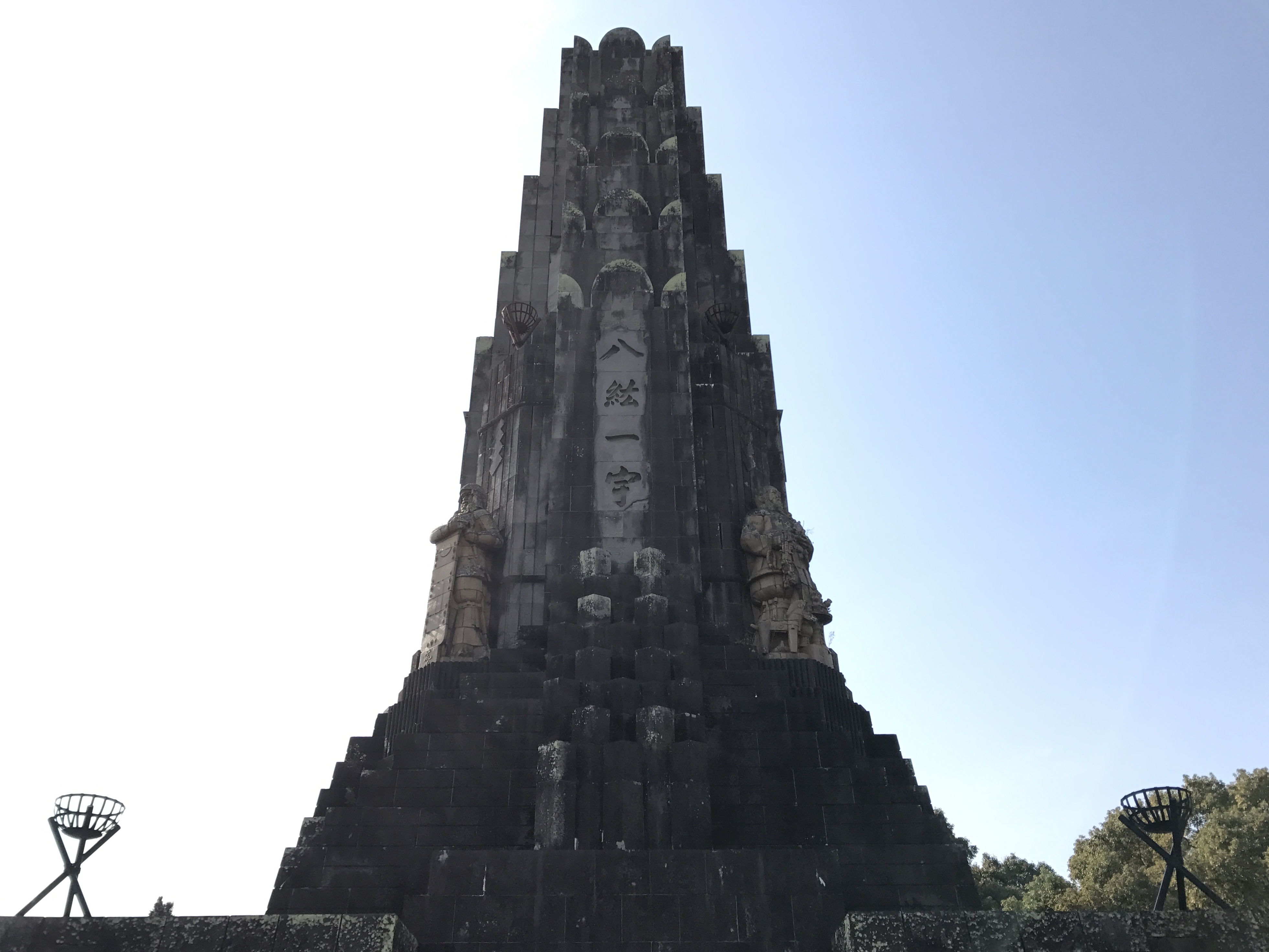 平和台公園・平和の塔